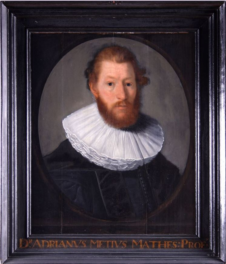 Portret in olieverf van Adriaan Metius, professor in de wiskunde aan de Franeker universiteit van 1598 tot 1635. Adriaan Metius (Alkmaar 9 december 1571 - Franeker 16 september 1635) heette eigenlijk Adriaan Adriaansz, maar het verhaal gaat dat medestudenten aan de Franeker universiteit hem de bijnaam Metius gaven, omdat hij zo geïnteresseerd was in wiskunde. Net als zijn vader overigens, die ingenieur en fortenbouwer was. Metius studeerde ook in Leiden, Rostock en Jena en ging in de leer bij Tycho Brahe, de beroemde sterrenkundige. Terug in de Republiek werd hij landmeter en kaartenmaker, tot hij door stadhouder Willem Lodewijk werd aanbevolen als hoogleraar wiskunde in Franeker. (tekst: Museum Martena)